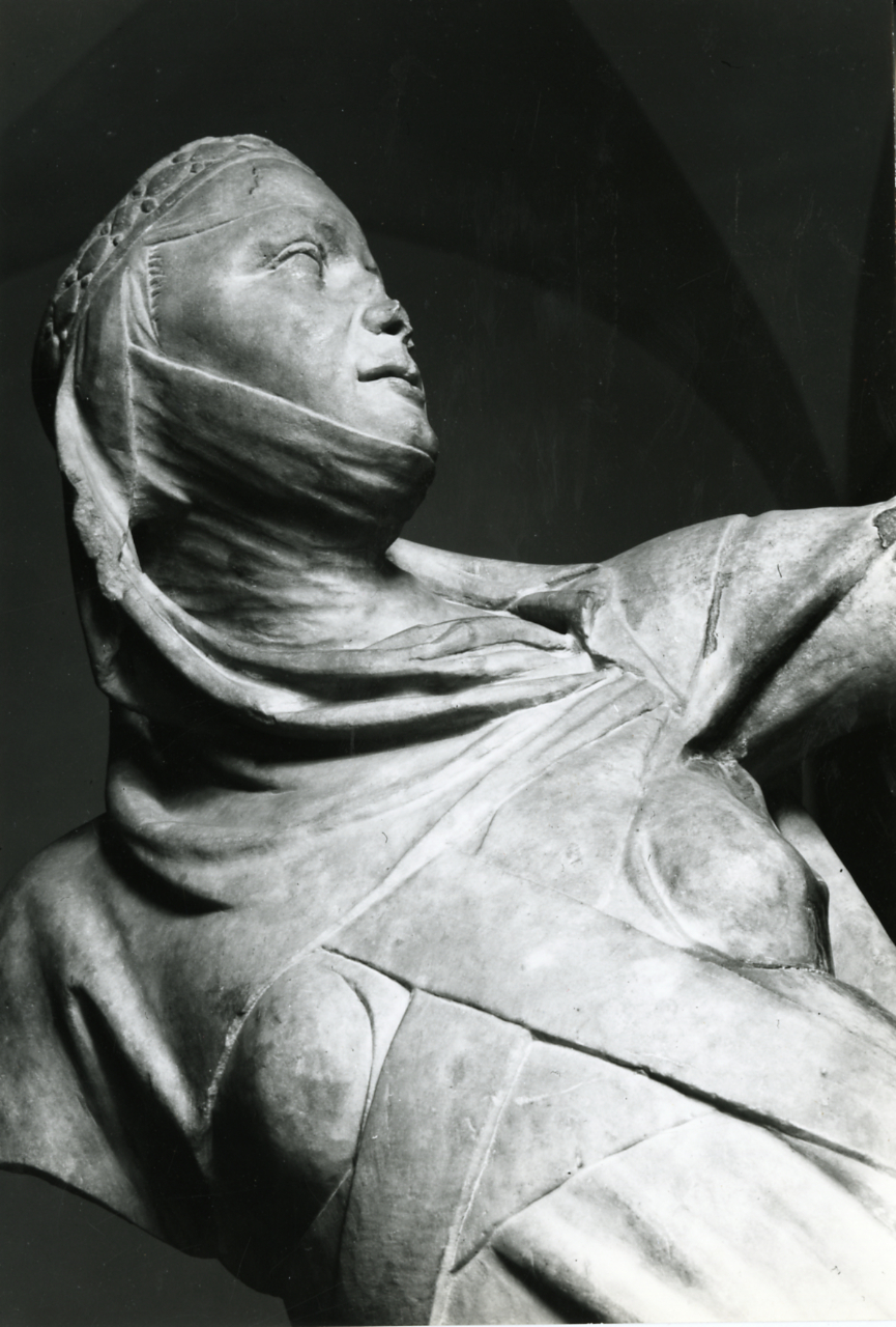 Genova. Galleria di Palazzo Bianco. Giovanni Pisano, "Monumento funebre a Margherita di Brabante", 1313-1314, particolare. Oggi conservato al Museo di Sant'Agostino, Genova. Servizio fotografico : Genova, 1967 / Paolo Monti. - Stampe: 3 : Positivo b/n, gelatina bromuro d'argento/ carta, 18x24, 24x30. - ((Al verso delle stampe manoscritti i numeri dei negativi corrispondenti: 10502 (lo stesso numero identifica 2 stampe - 2 copie), 10503. - timbro a inchiostro con copyright: "© Copyright/ Credit to/ Paolo Monti/ Corso Sempione [...]/ Milano". - Sul coperchio della scatola iscrizione didascalica manoscritta a pennarello nero: "Scultura". - Oggi conservati al Museo di Sant'Agostino, Genova. - Occasione: Documentazione della Galleria di Palazzo Bianco: sculture. - Fonte: Agenda di Paolo Monti: Monti/ 2/ 6 giugno 1964 - 31 marzo 1966/ 8194-12420 (1964-1963), presso Archivio Paolo Monti. - Fonte: Fattura di Paolo Monti: IV. Commesse/ Fattura n. 15/ Riprese fotografiche Palazzo Bianco (1967/02/28), presso Archivio Paolo Monti. 4 riprese fotografiche Linhoff 10x12 sculture Palazzo Bianco foto 10500/502, 10503/505; 15 ingrandimenti 24x30 [...]